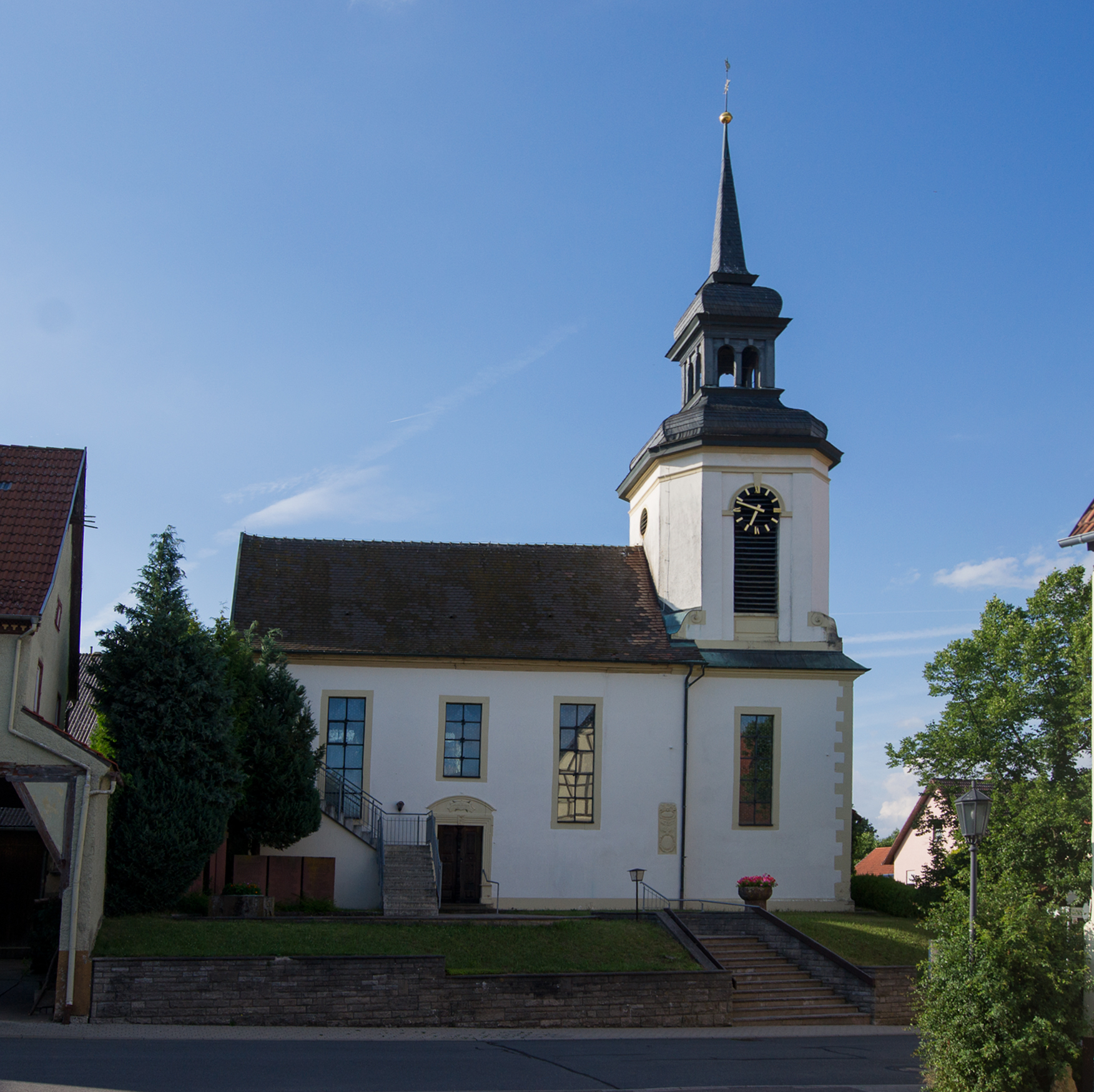 Die Südseite der Evangelische Kirche von Buch am Ahorn